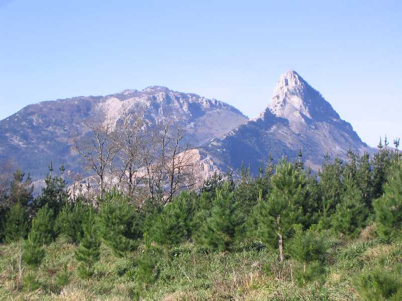 Vista del monte Mugarra, Vizcaya, País Vasco, España.